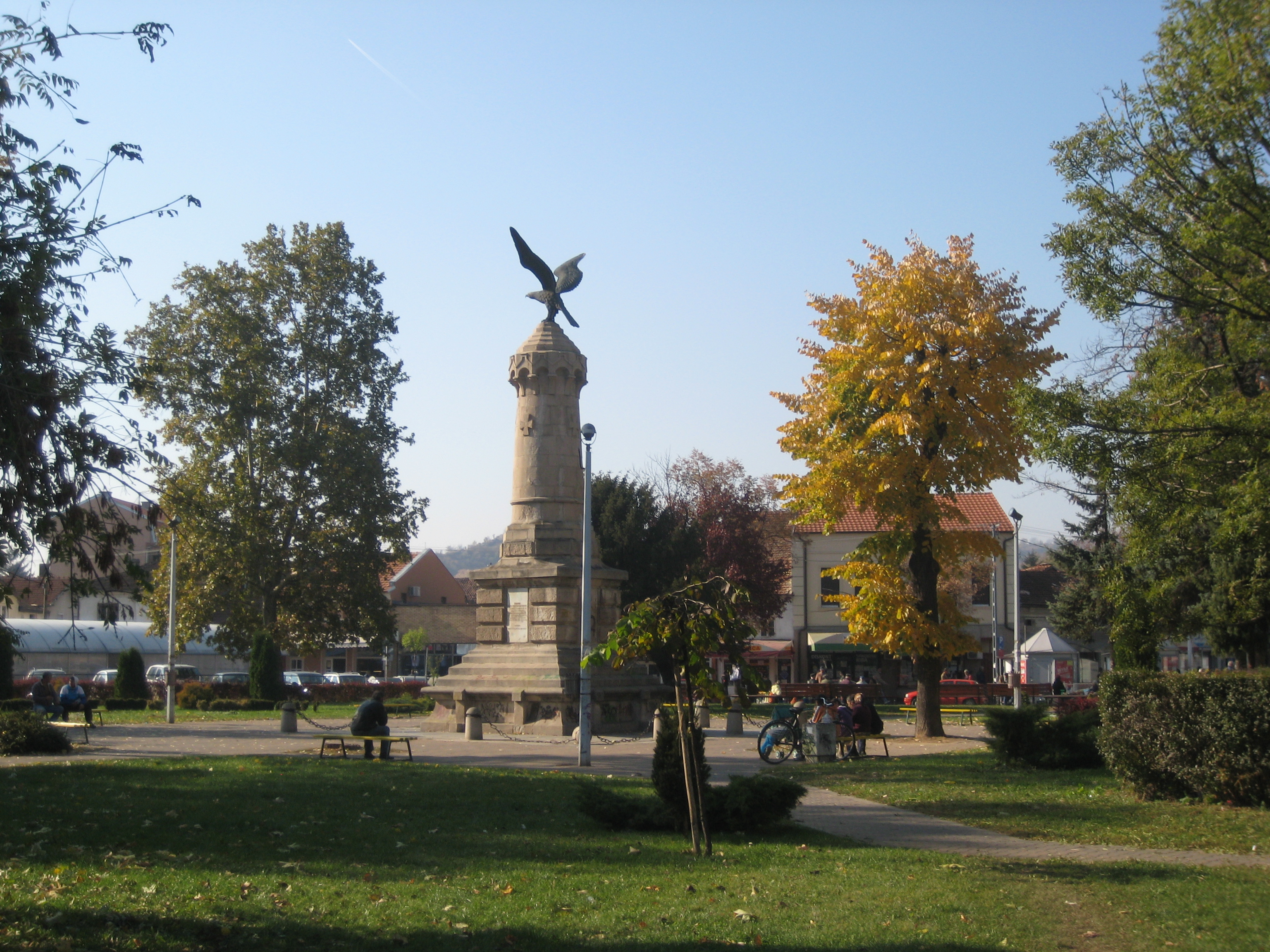 Park u Pirotu